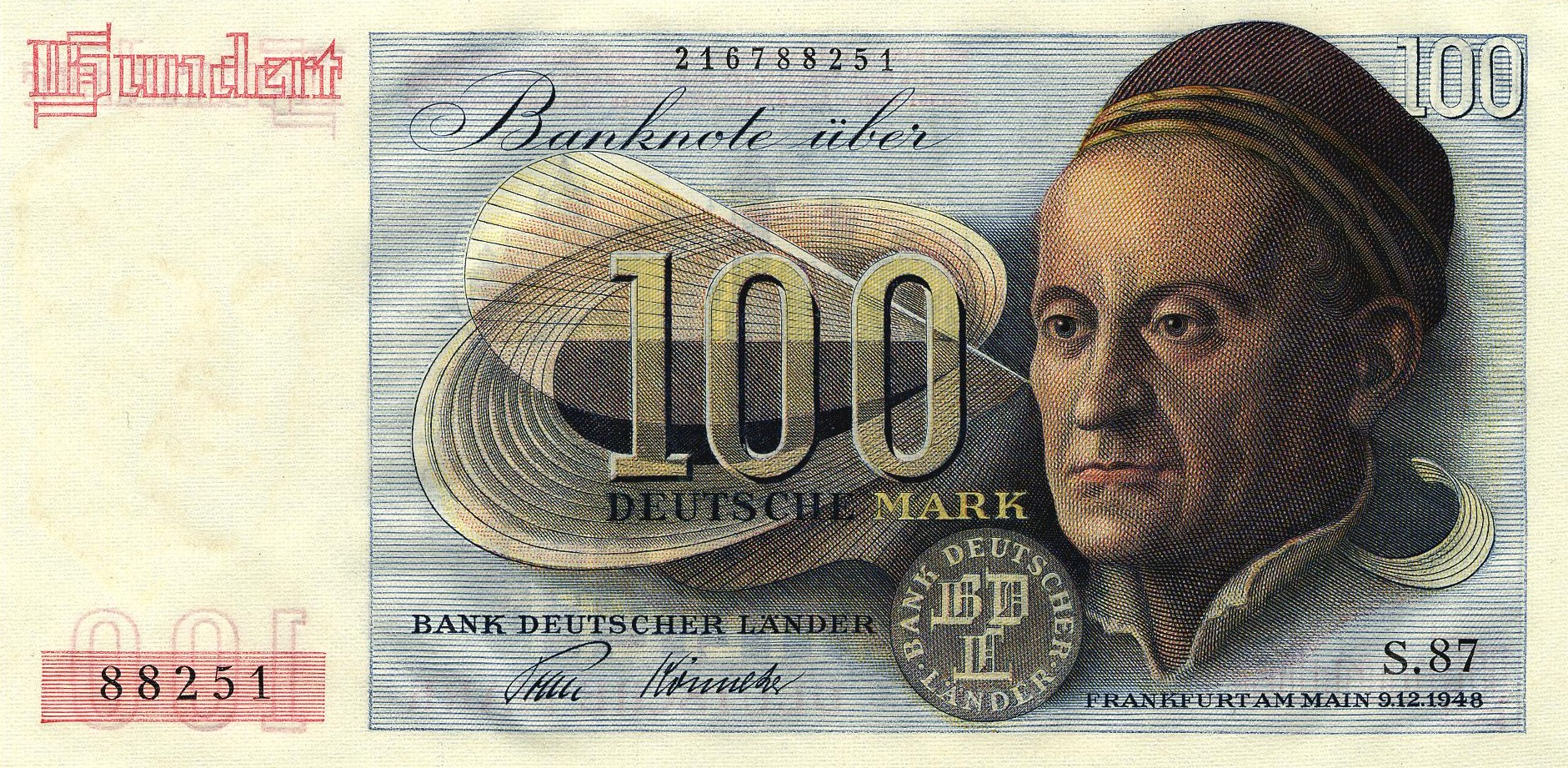 100 DM Schein (Serie 2), Vorderseite - Serie II BdL )